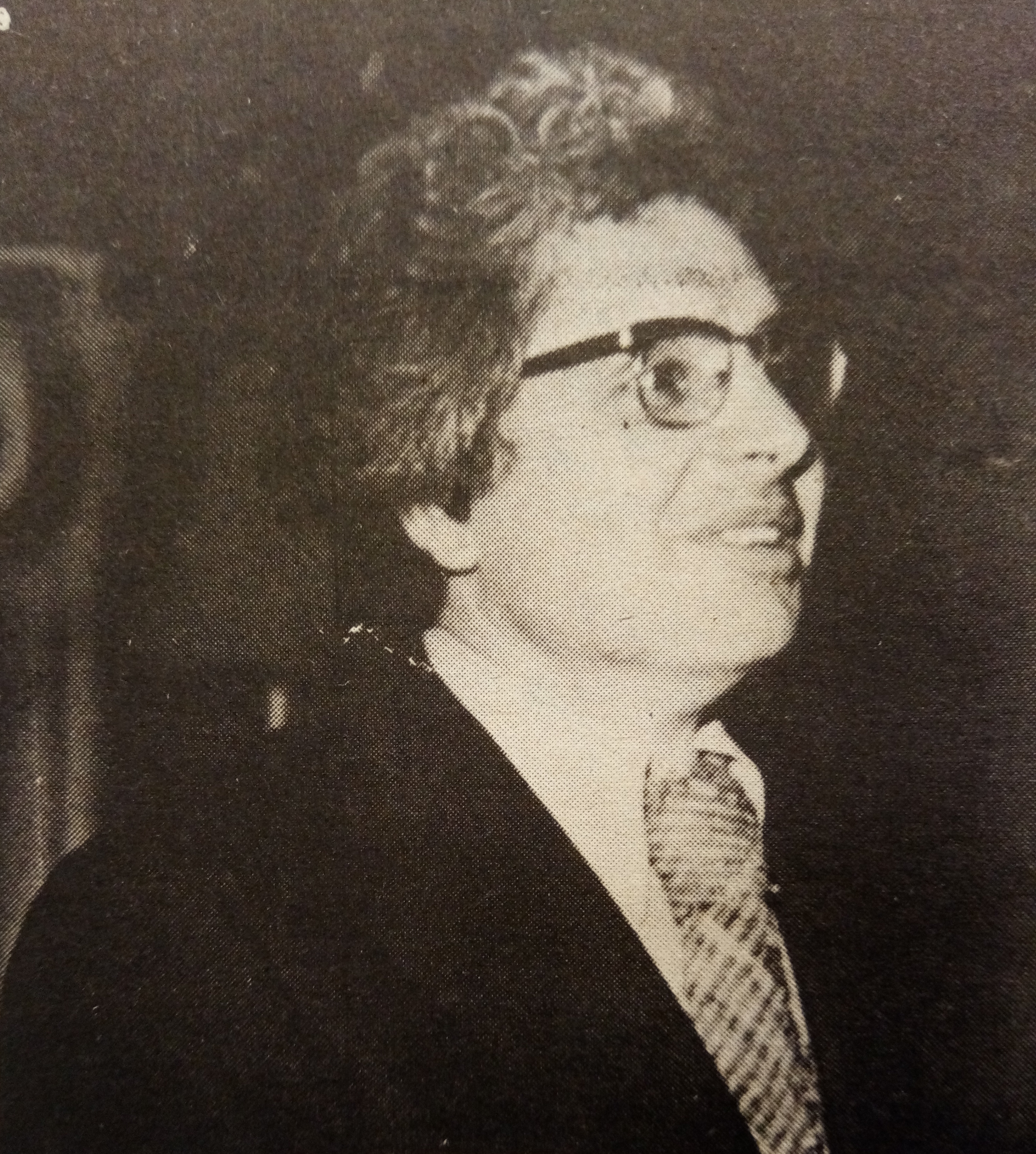 Assabah 1980